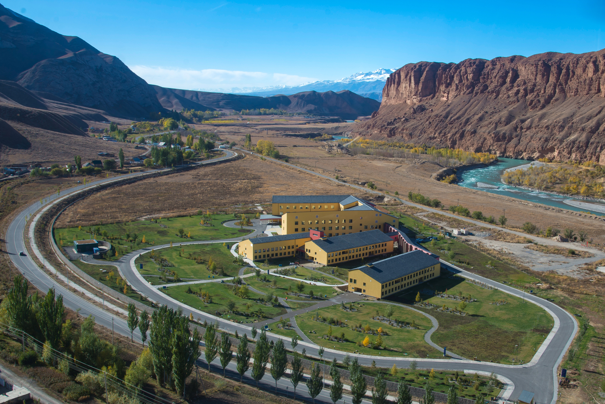 Кампус УЦА в Нарыне Кыргызча: БАУнун Нарын шаарындагы кампусус